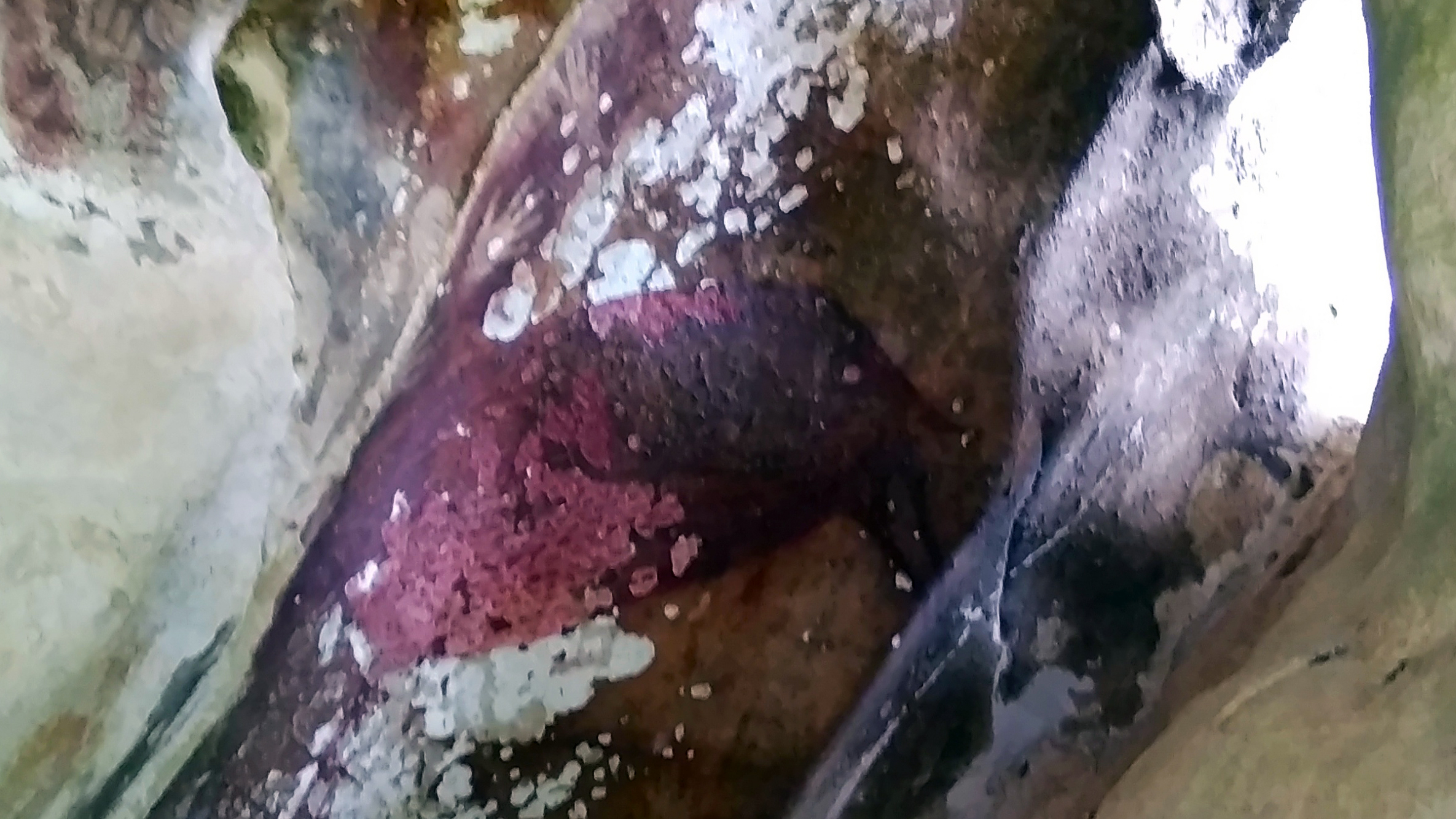 Lukisan babi-rusa di Gua Pettakere, Maros, Sulawesi Selatan. Lukisan prasejarah ini diperkirakan berusia 35.400 tahun.